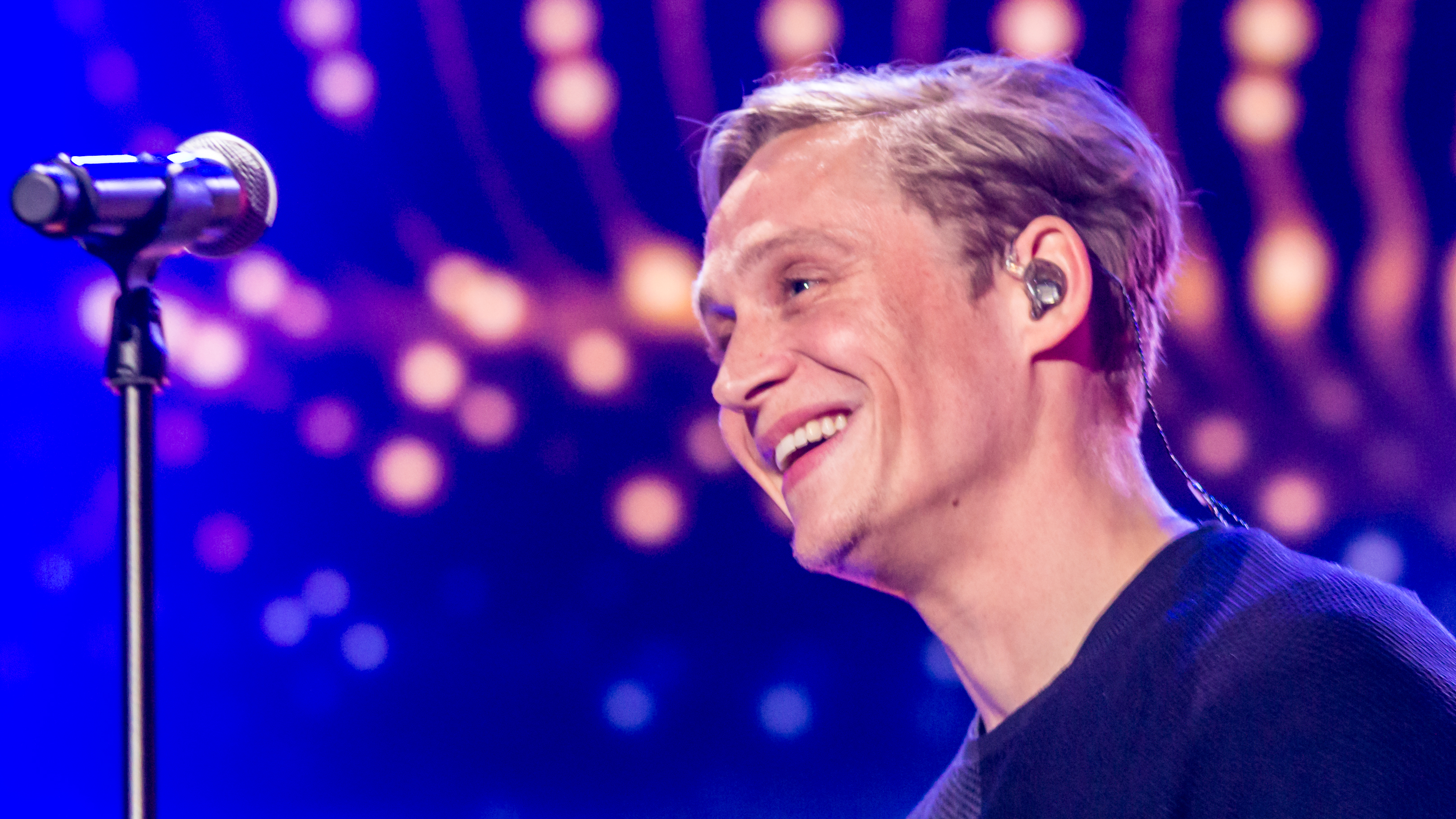 Unser Song 2017 - Generalprobe - Matthias Schweighöfer